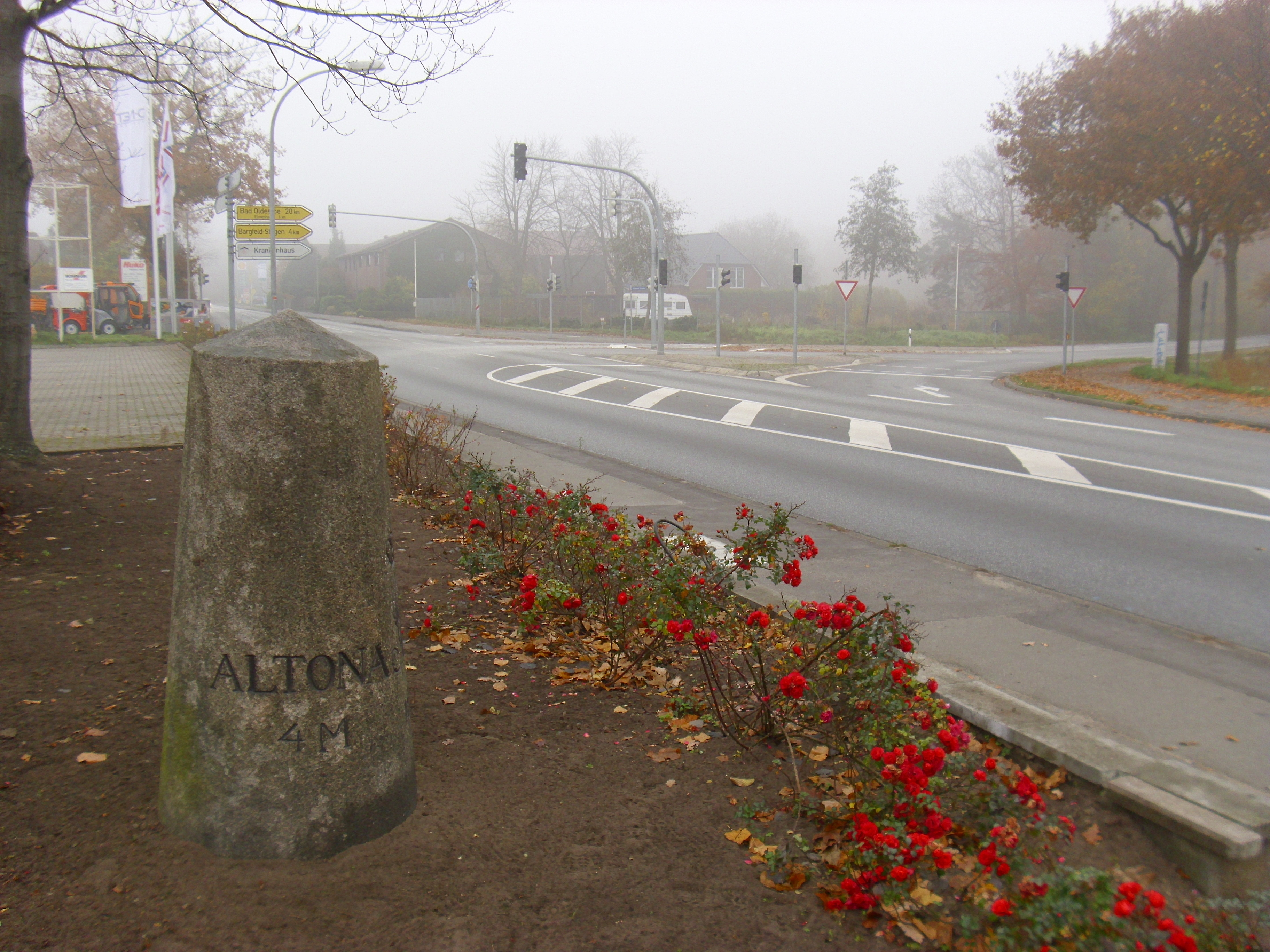 Vollmeilenstein an der Altona-Lübecker Chaussee in Kayhude/Heidkrug. Entfernung nach Altona 4 Meilen (30 km), nach Lübeck 5½ Meilen (42 km). Im Hintergrund zweigt rechts der weitere Verlauf der Altona-Lübecker Chaussee ab. Geradeaus beginnt die Altona-Neustädter Chaussee.